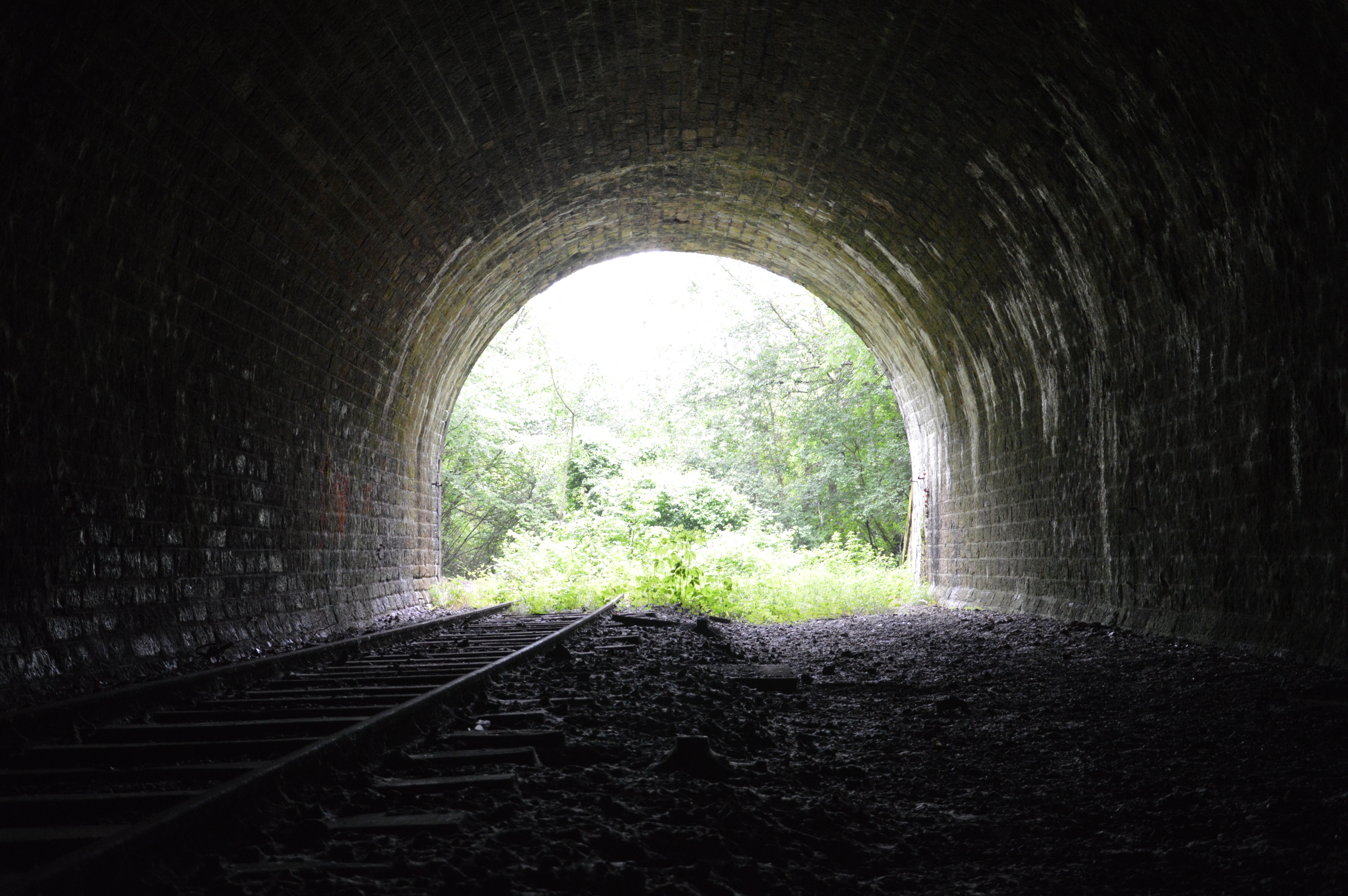 Entrée du tunnel de Jeugny envahi par la végétation. Ce tunnel ferroviaire fait partie de la ligne Saint-Julien à Saint-Florentin. On remarque bien l'ancien passage de la seconde voie.